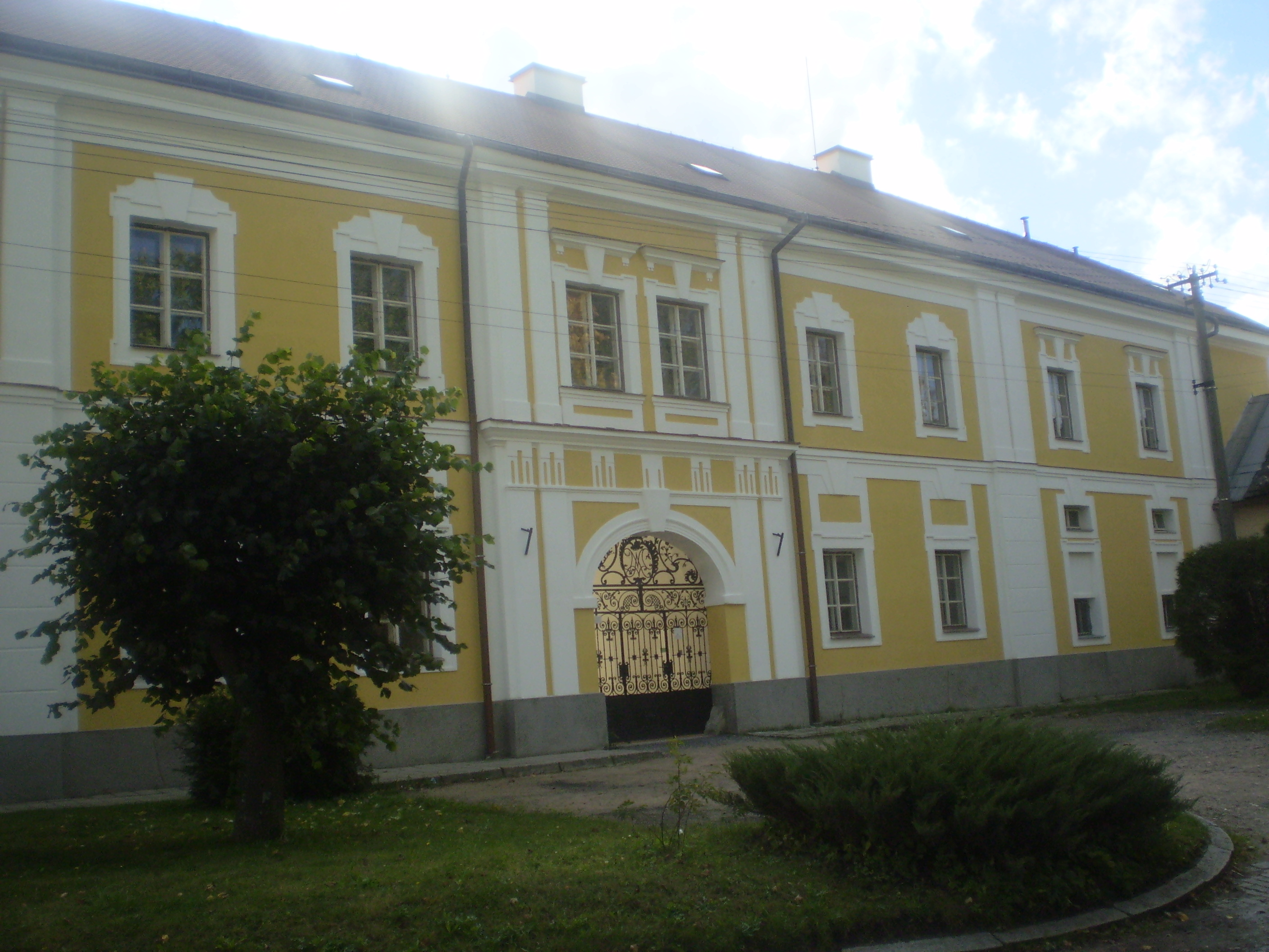 Průčelí jimramovského zámku